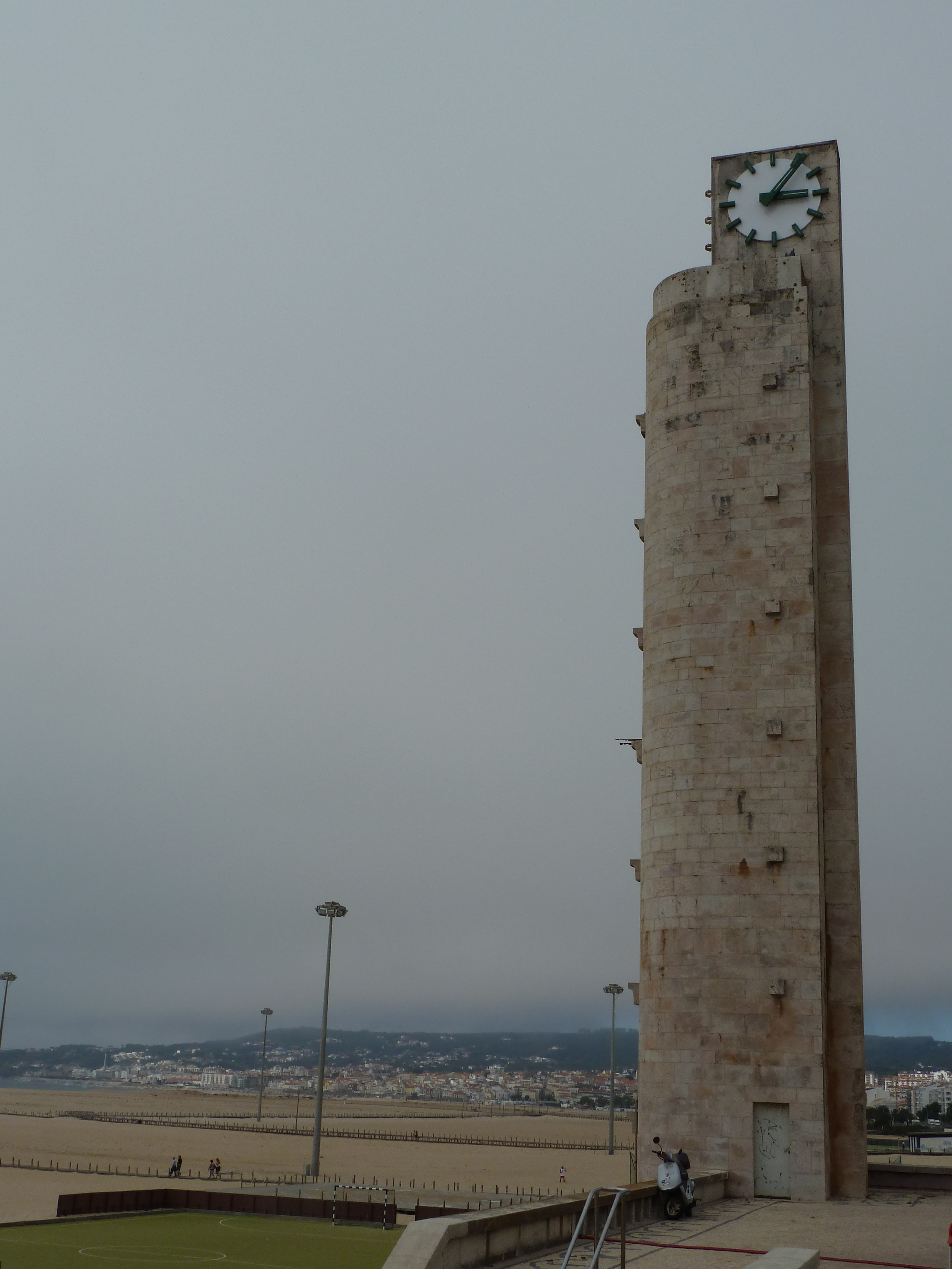 Torre do reloxio de Figueira da Foz. This file was uploaded for Wiki Loves Monuments in Portugal with the unique identifier 3754758.